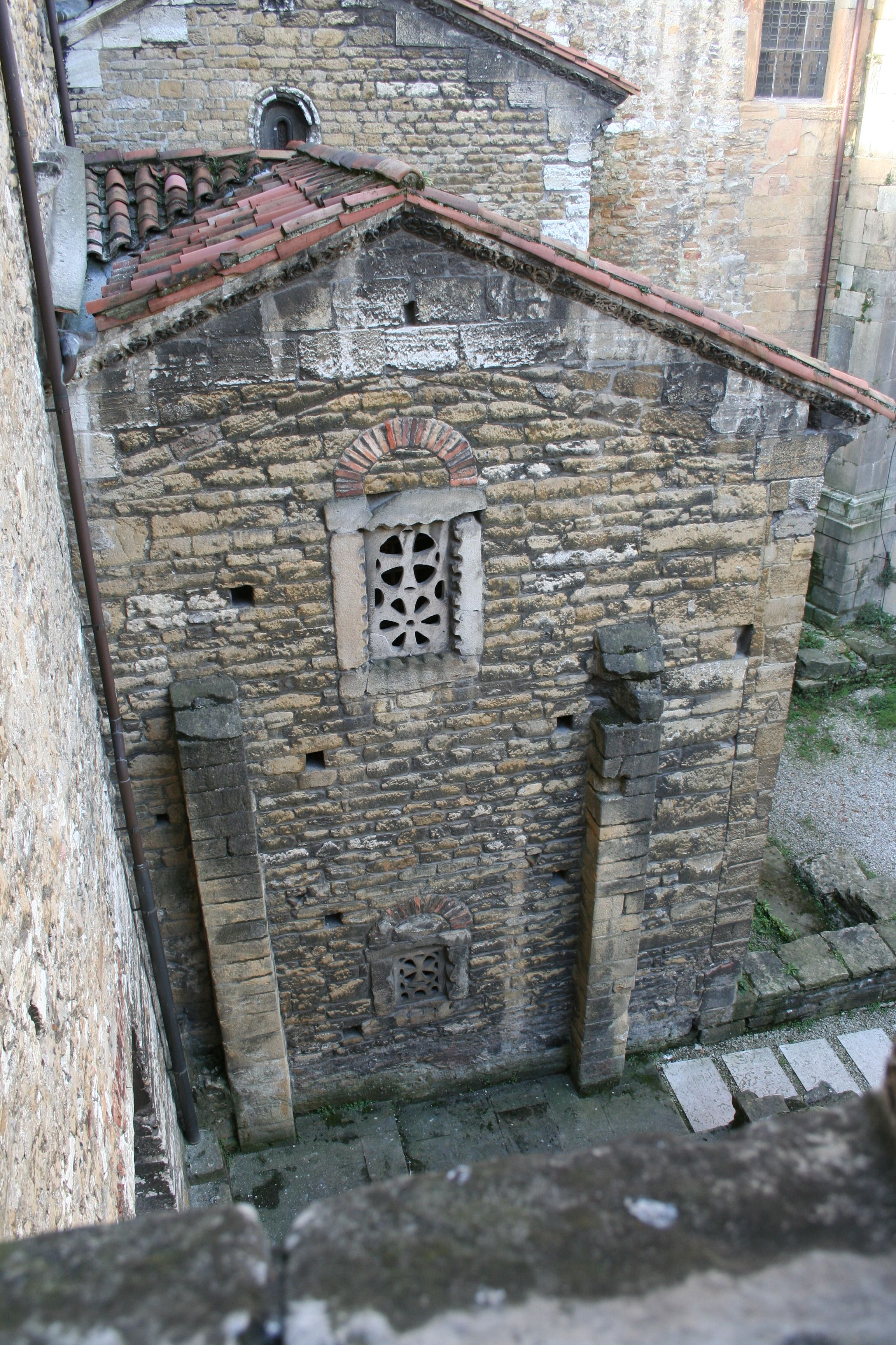 Frontal exterior de la cámara santa y de la cripta de Santa Leocadia